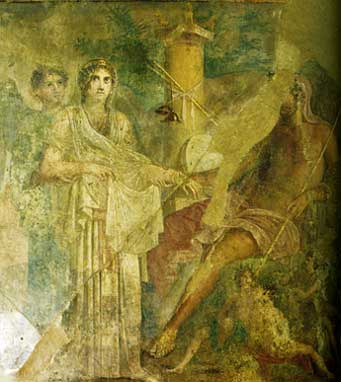 Crono e Rea assistita da Iride, affresco, quarto stile, c. 65 d. C., da modello di età classica. Da Pompei, Casa del Poeta tragico. Napoli, Museo Archeologico Nazionale (Luciano Pedicini, Napoli)